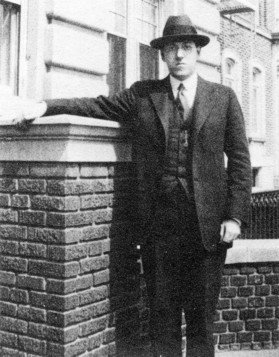 Lovecraft em Brooklyn em 1922.